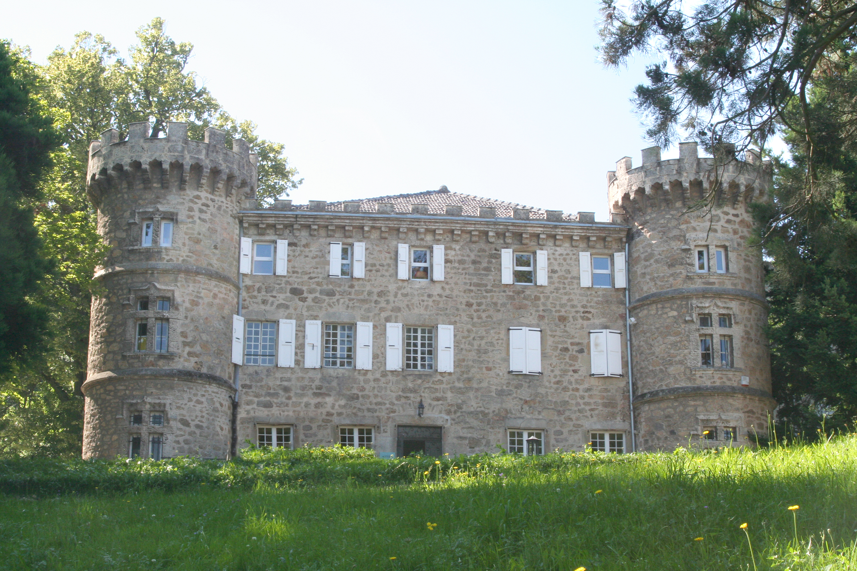 Château de Soubeyran